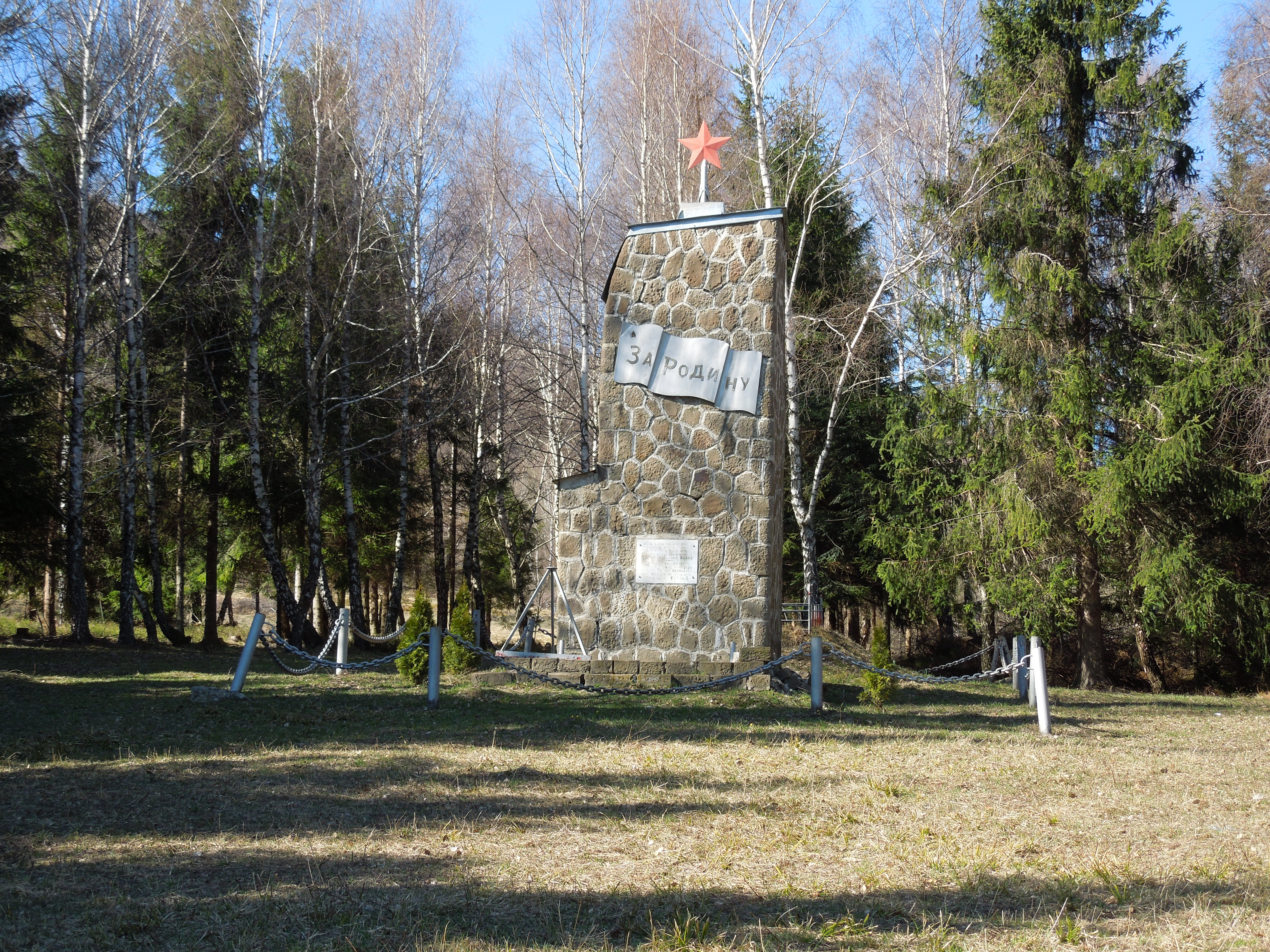 Pamätník Osloboditeľom z 2. svetovej vojny pod Ruským sedlom